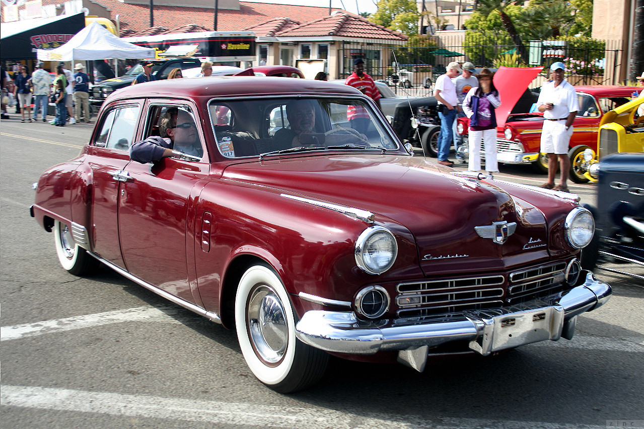 1947 Studebaker Land Cruiser (Commander Model 14A)